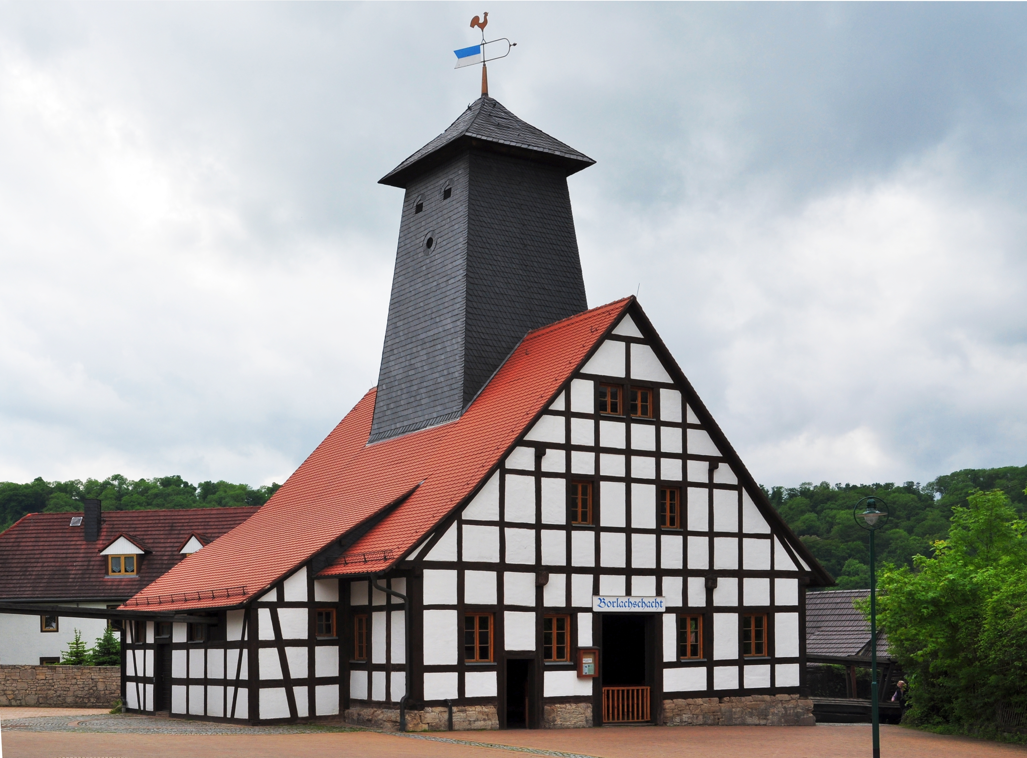 Gebäude über dem Borlachschacht in Bad Kösen